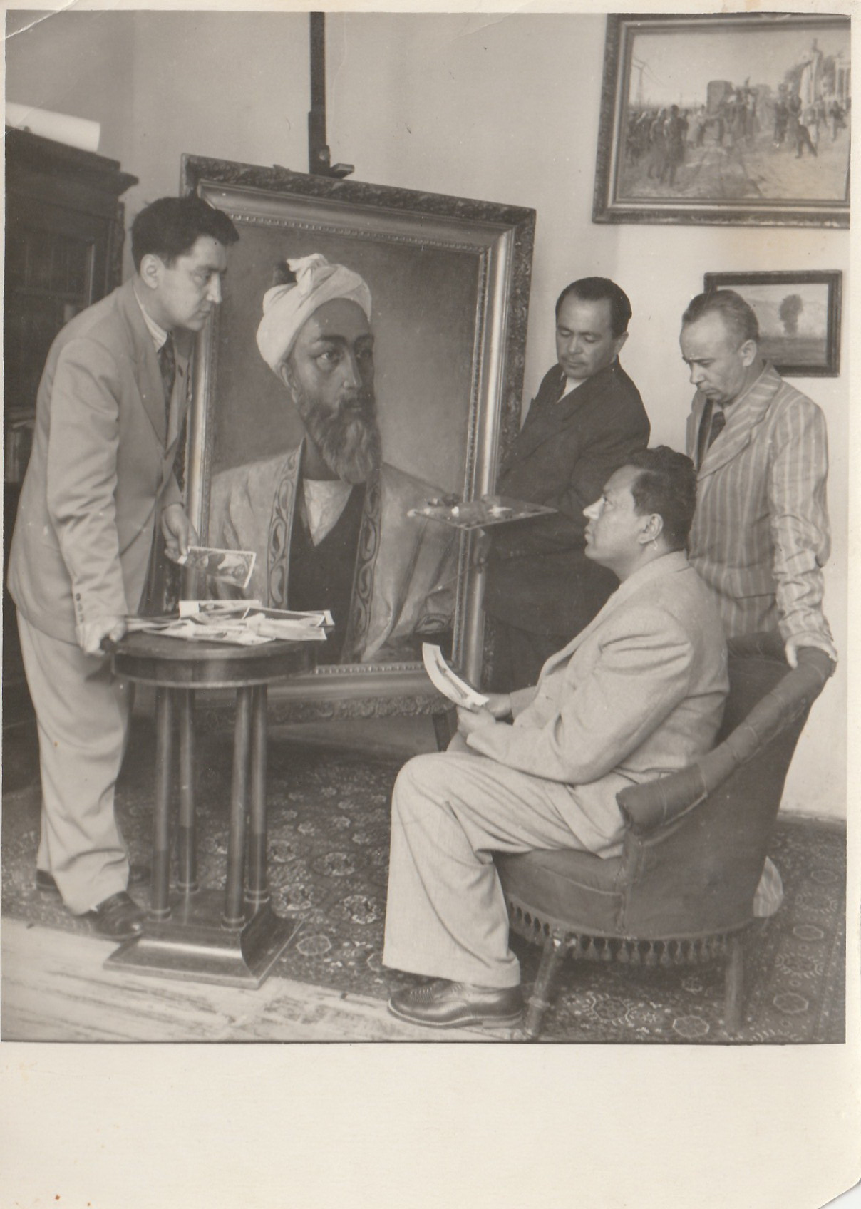 Oʻzbekcha/ўзбекча: Bogoutdion A.M/ o'z hamkasblari va shogirdlari bilan Abu Ali inb Sino portreti oldida